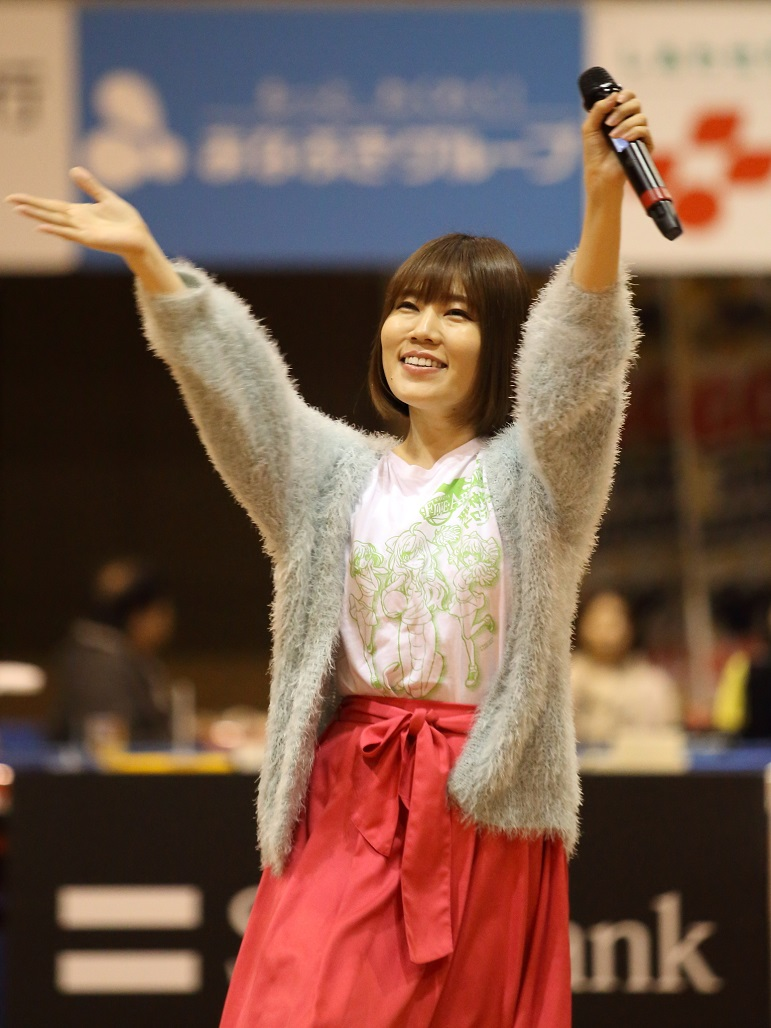 元SKE48メンバー、ソロシンガー